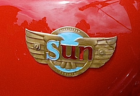 Logo der Marke Sun